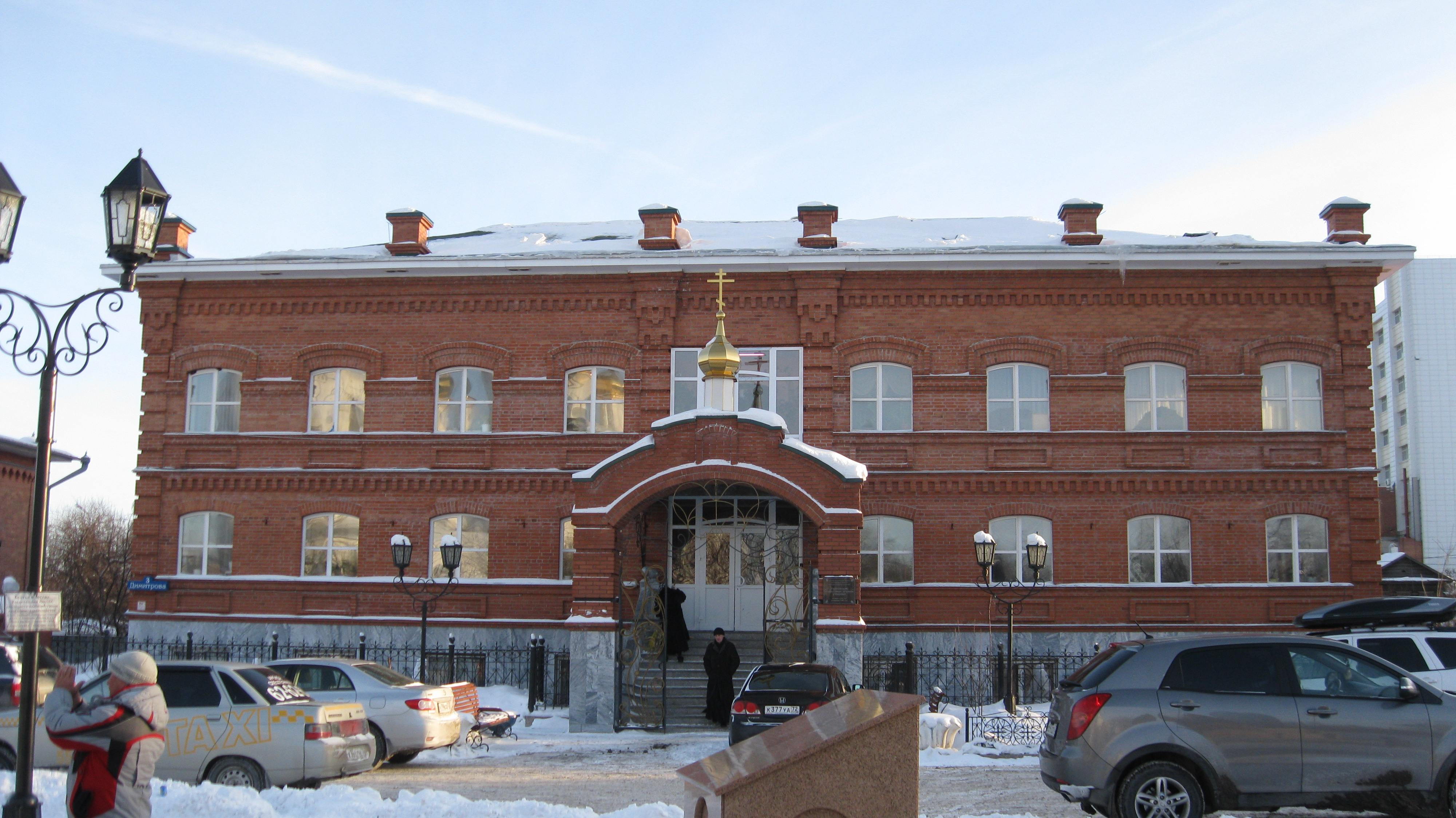 Тюменское православное духовное училище возле Троицкого монастыря